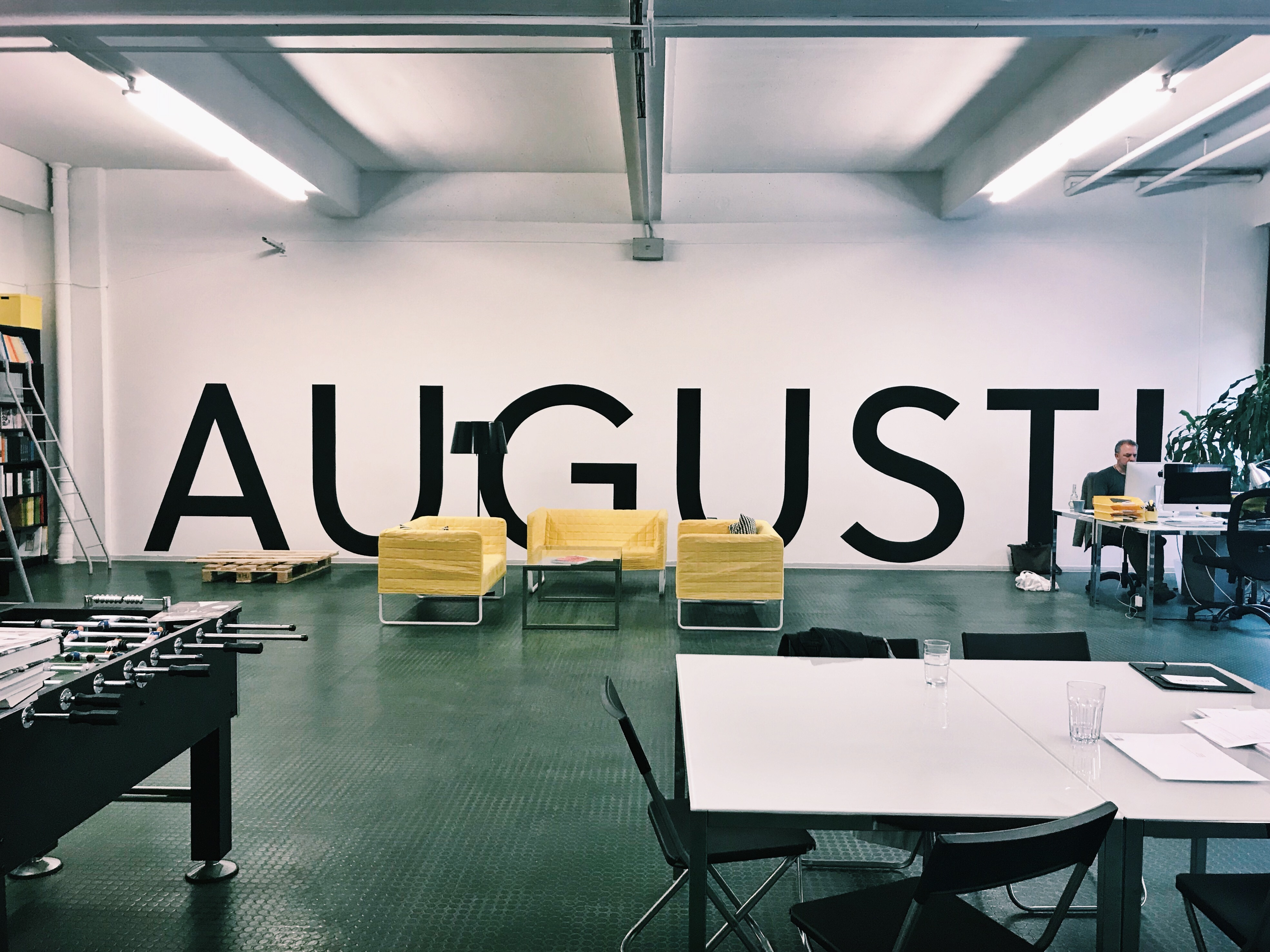 Die Verlagsräume im Münchner Westend.